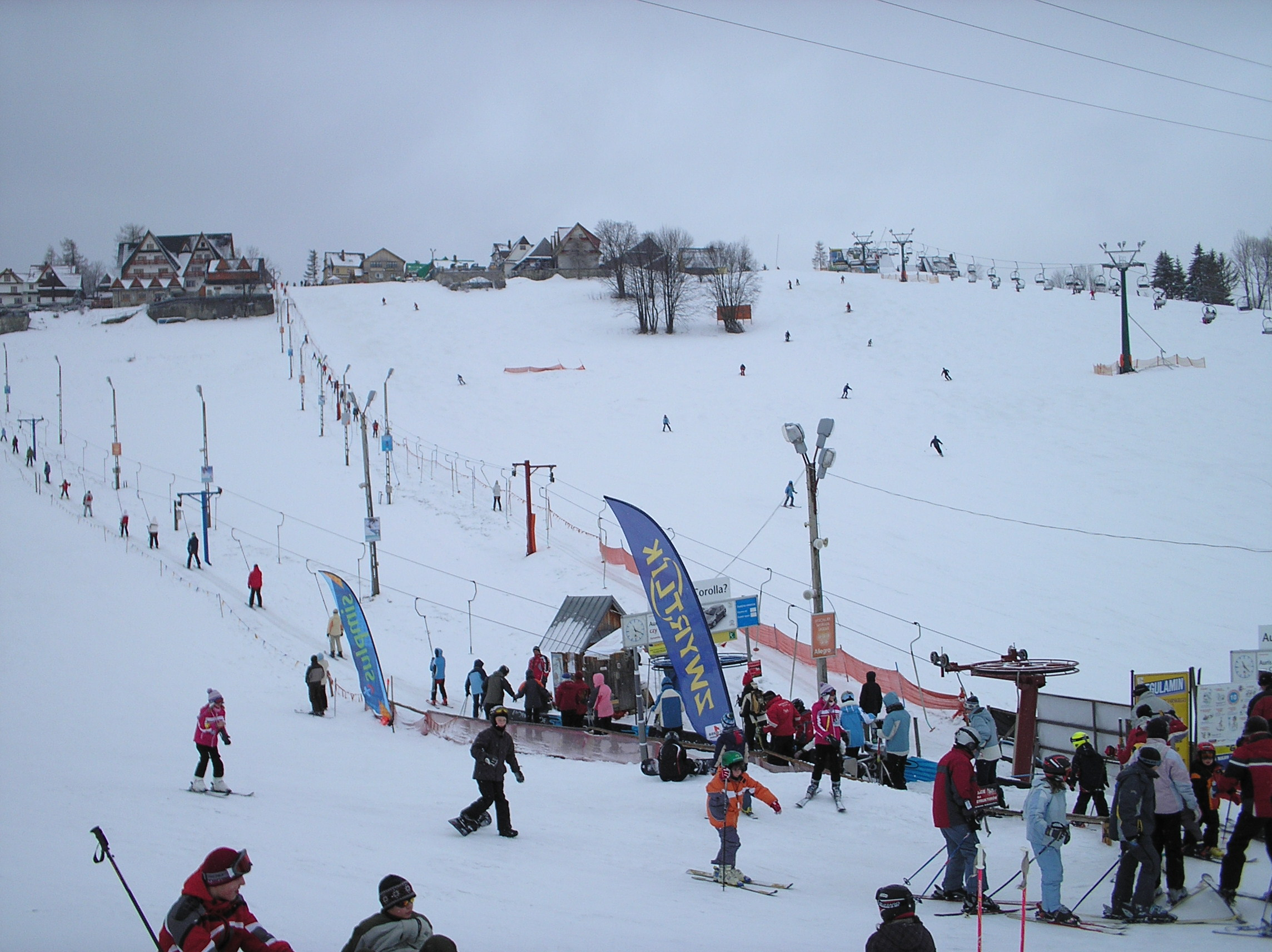 Bukowina Tatrzańska SKI